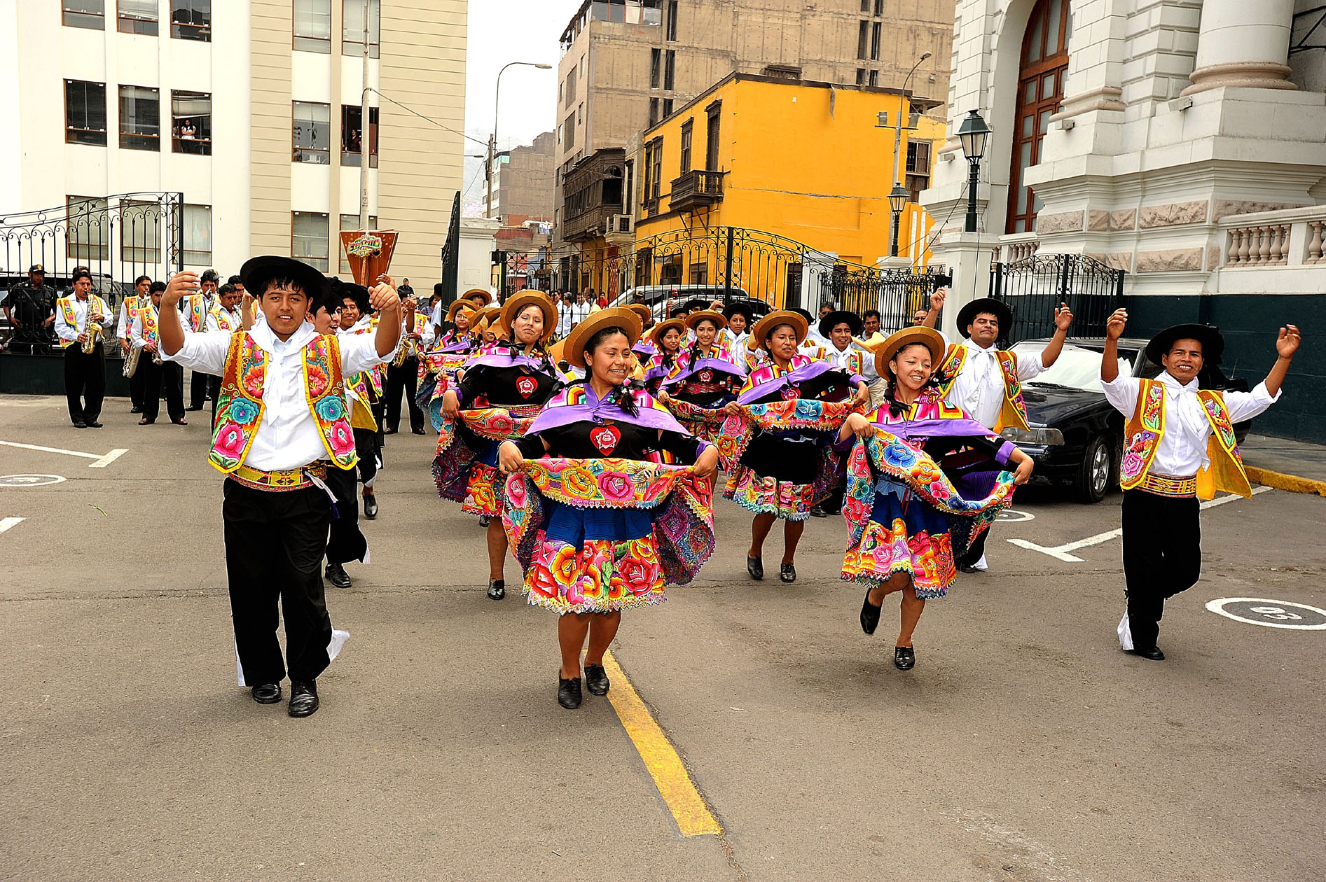 Un vistoso desfile de danzas vernaculares tuvo lugar hoy en la Plaza Bolívar como parte de las actividades previas al Carnaval de la Nación Huanca 2012-Huaylarsh para el mundo. En la actividad, cuya previa conferencia de prensa ofrecieron los parlamentarios Casio Huaire y Federico Pariona, estuvieron autoridades del departamento de Junín.